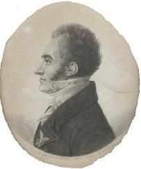 exemple de physionotrace